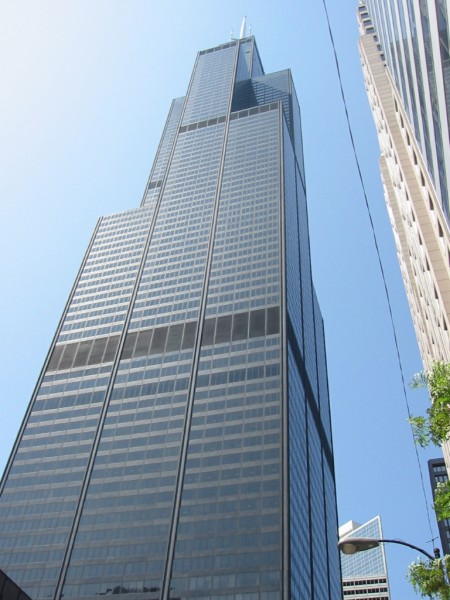 Der Sears Tower in Chicago